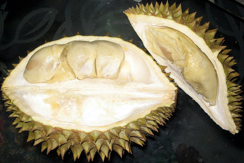 Gambar oleh Yosri - Dibebaskan di bawah